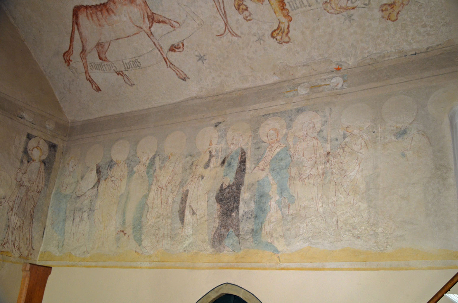 Martinskirche in Lauffen am Neckar: Die Zwölf Apostel an der Südwand im Chor.